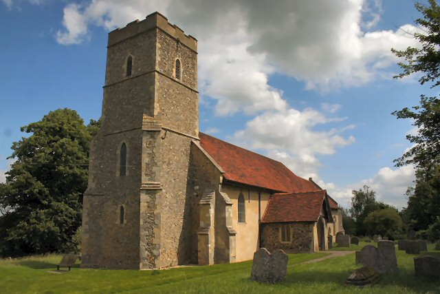 St Peter's Church, Elmsett